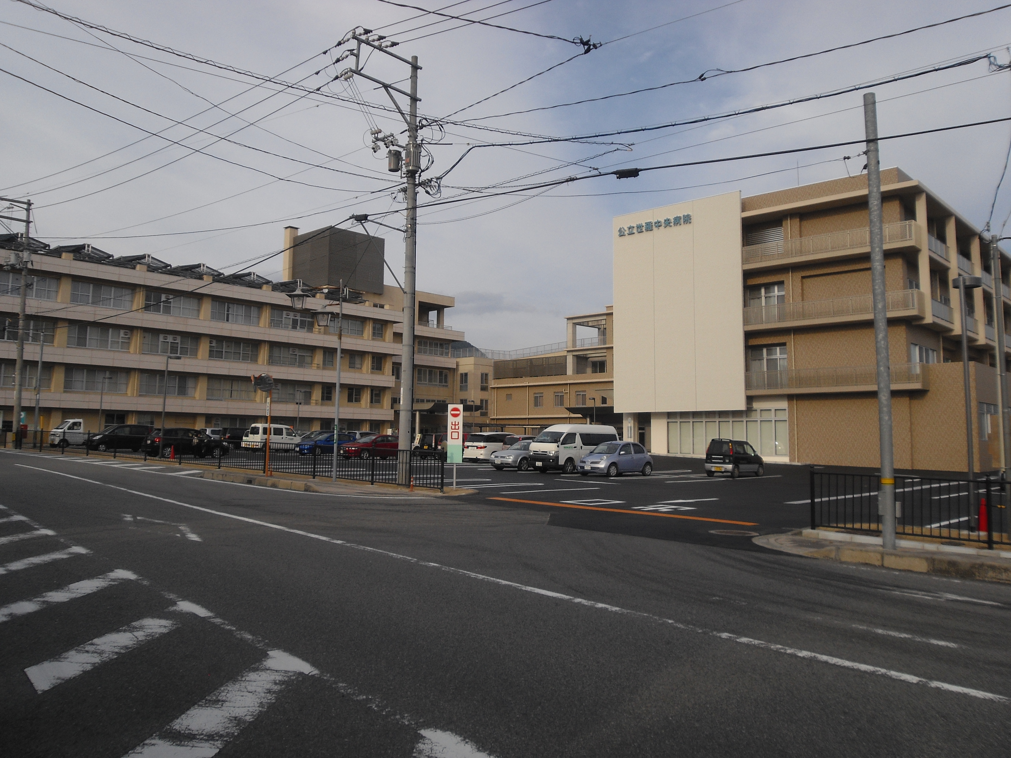 世羅中央病院の写真